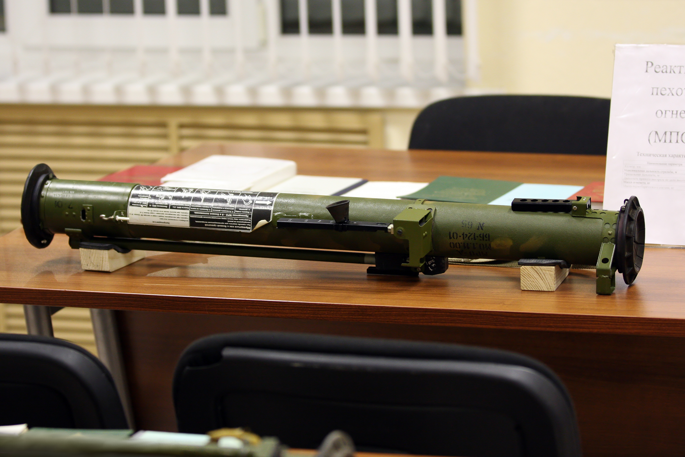 Учебный класс с макетами огнеметов для изучения материальной части. Малогабаритный реактивный огнемет МРО-Д (MRO-D)